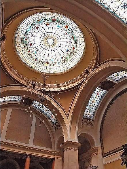 Oberlausitzer Ruhmeshalle in Zgorzelec.